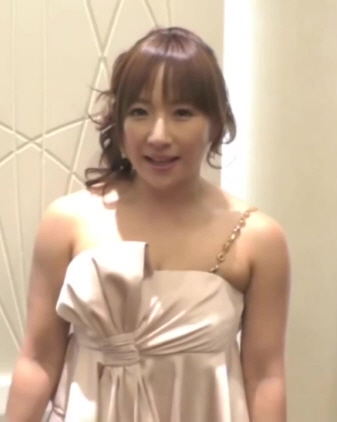 4.29両国へ向け 愛川ゆず季ラストメッセージ